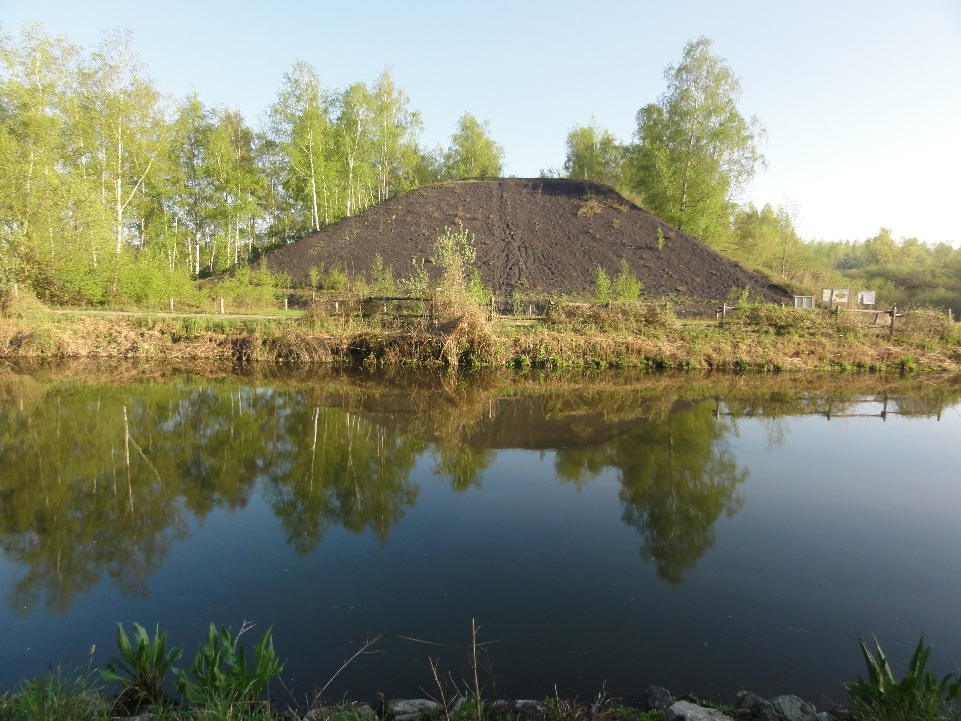 Terril n° 143A dit Germinies Nord, Fosse Barrois, Marchiennes et Flines-lez-Raches, Nord, Nord-Pas-de-Calais, France.